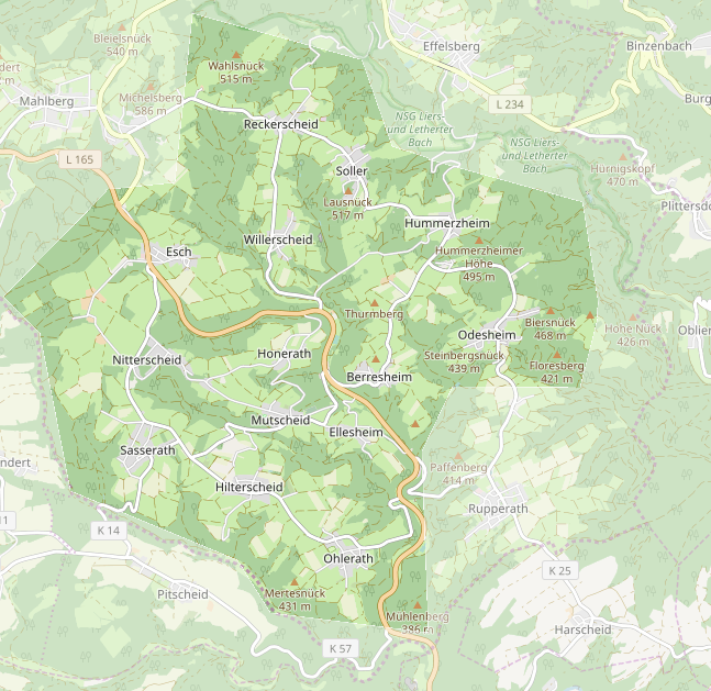 Die Karte zeigt die ungefähre Lage der Dörfergemeinschaft Mutscheid und ihrer 14 Dörfer. This map may be incomplete, and may contain errors. Don't rely solely on it for navigation.